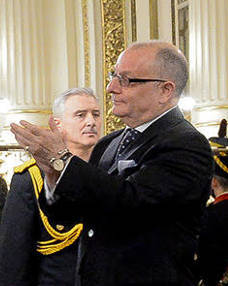 El presidente Mauricio Macri sostuvo que con el ministro Jorge Faurie al frente de la Cancillería la Argentina continuará “profundizando su relación con el mundo” para “integrarse, animarse a competir y desarrollar todas sus potencialidades”.